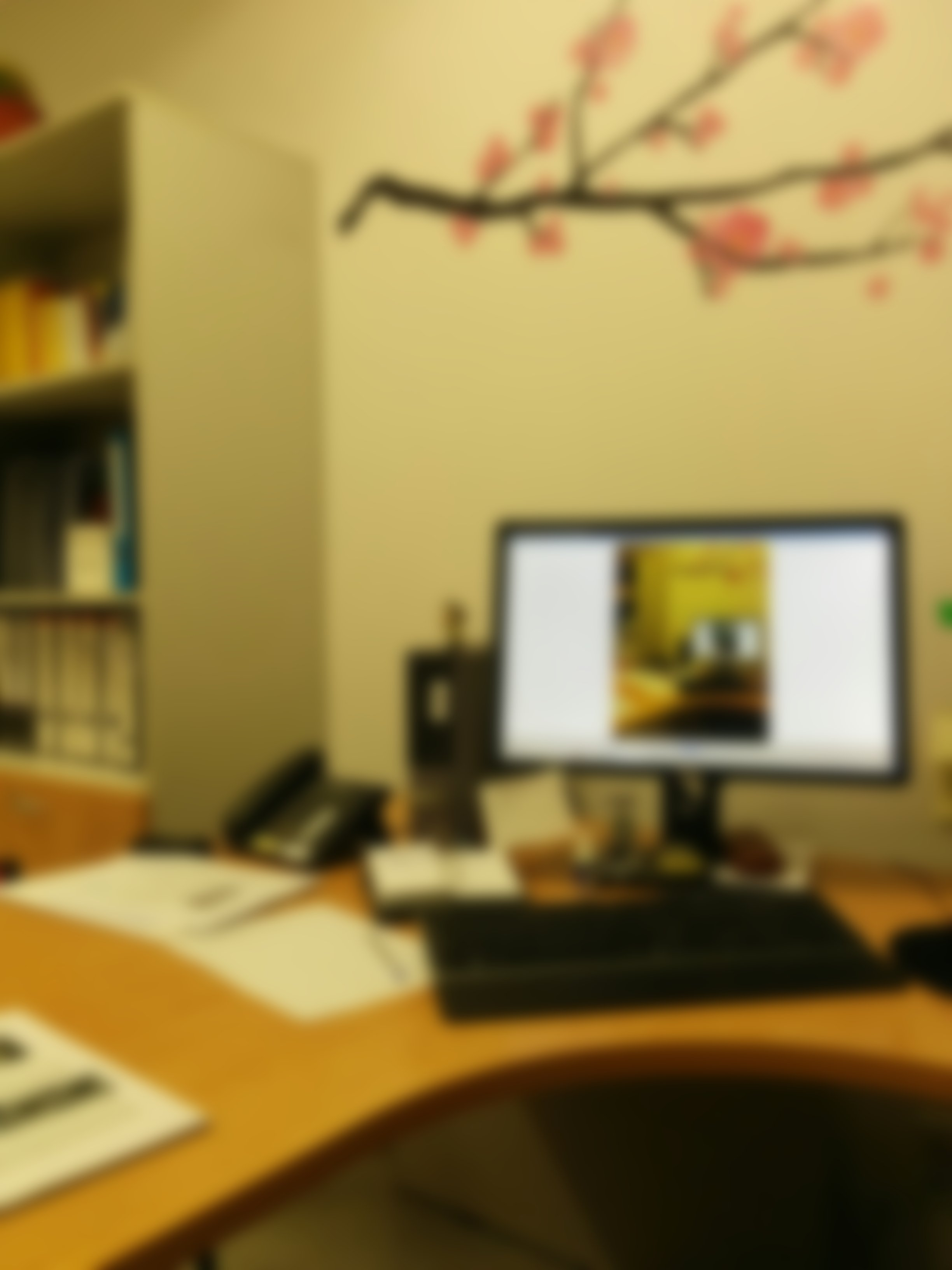 Imagen a la que se ha aplicado un filtro gaussiano con sigma = 20 píxeles